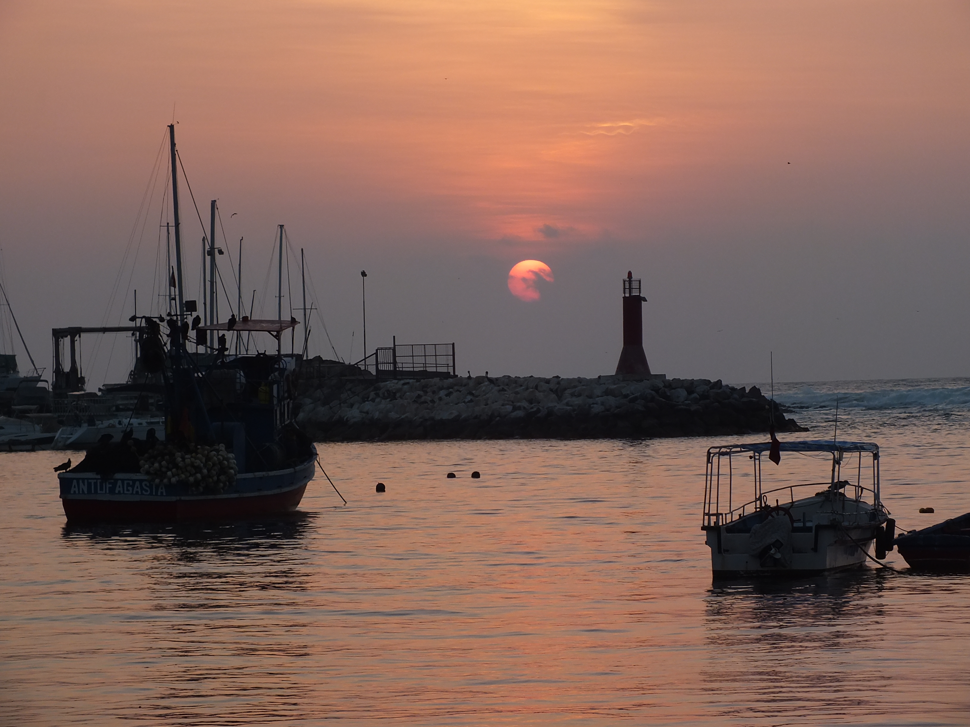 Molo y muelle de la ex Compañía de Salitre de Antofagasta: Nunca había fotografiado antes un monumento histórico en el ocaso de un día. This is a photo of a national monument in Chile: 312